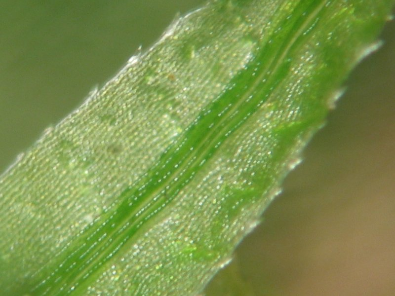 Assimilationslamellen auf der Blattrippe bei Atrichum undulatum, Müritz-Gebiet